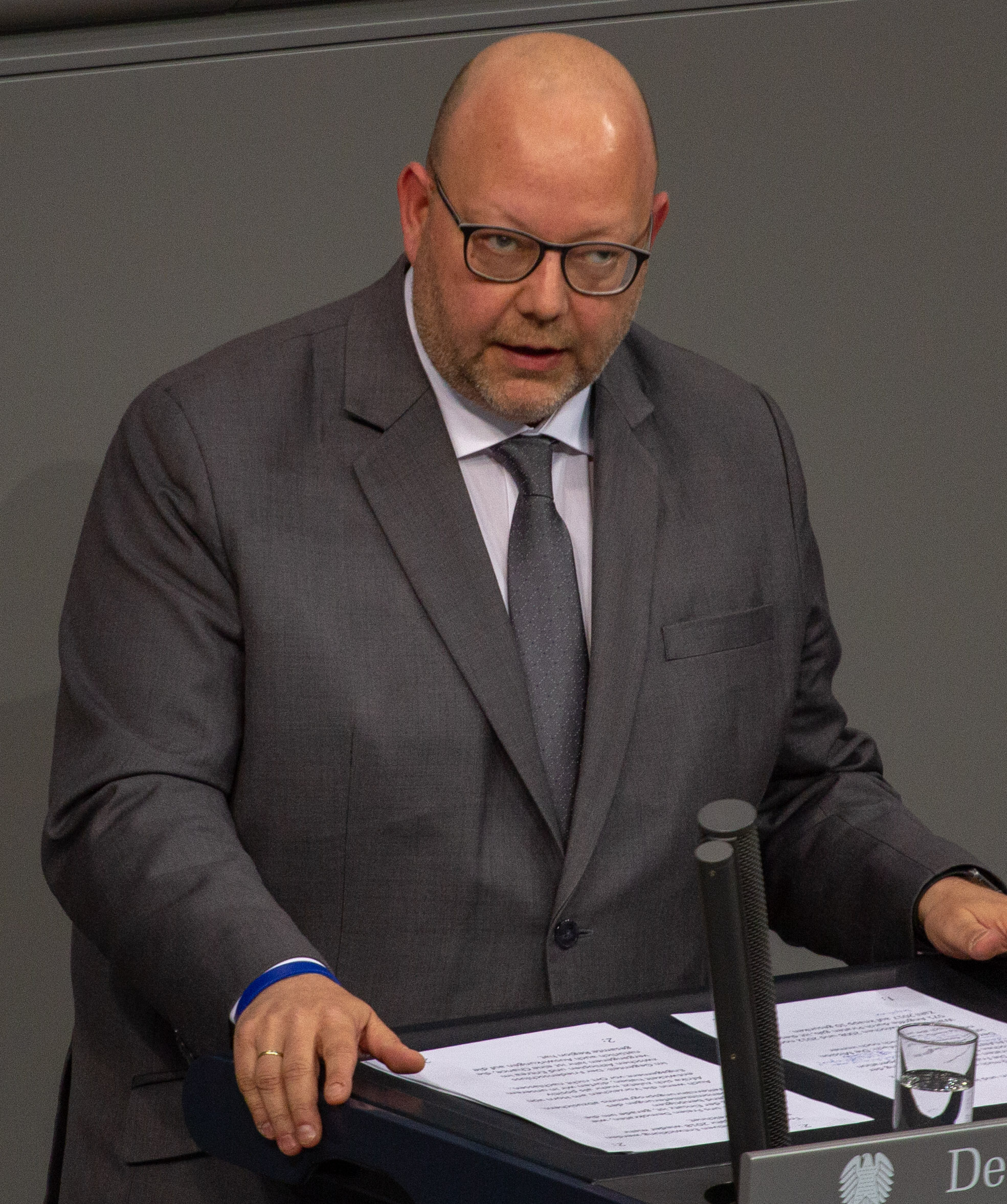 Olaf in der Beek, Mitglied des Deutschen Bundestages, während einer Plenarsitzung am 11. April 2019 in Berlin.